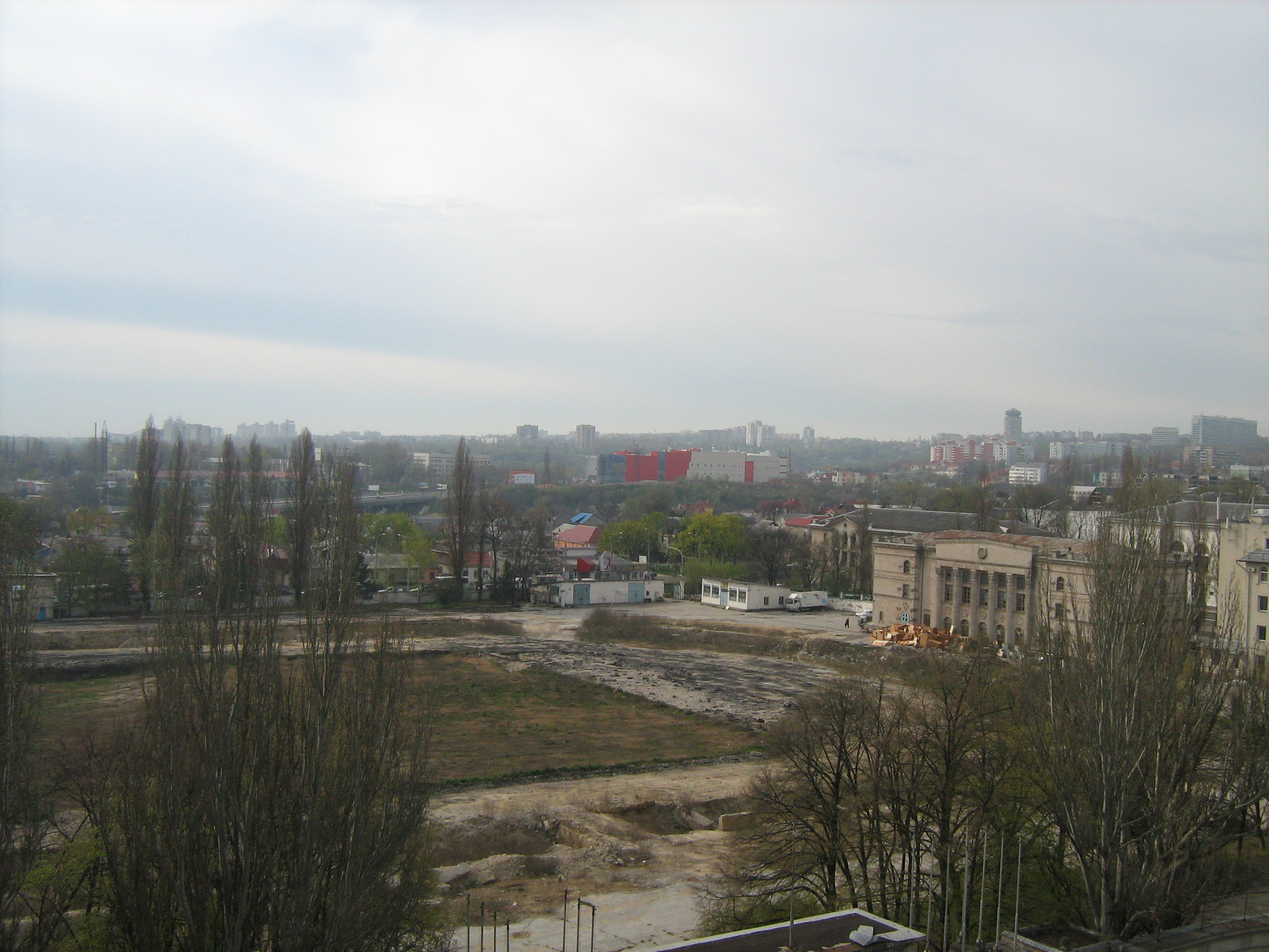 ...до основания, а затем...